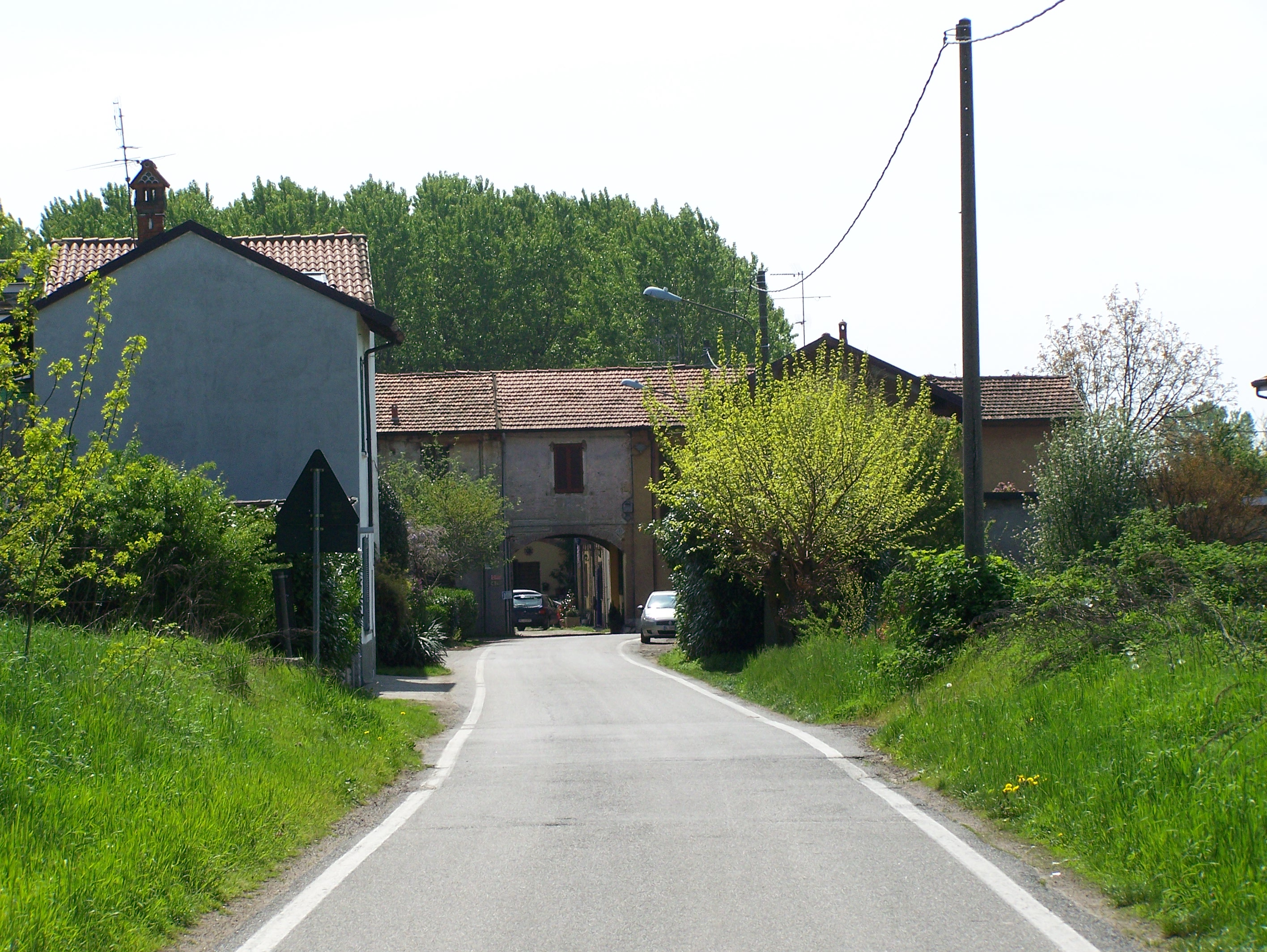 Preloreto, localita a Corbetta (MI)